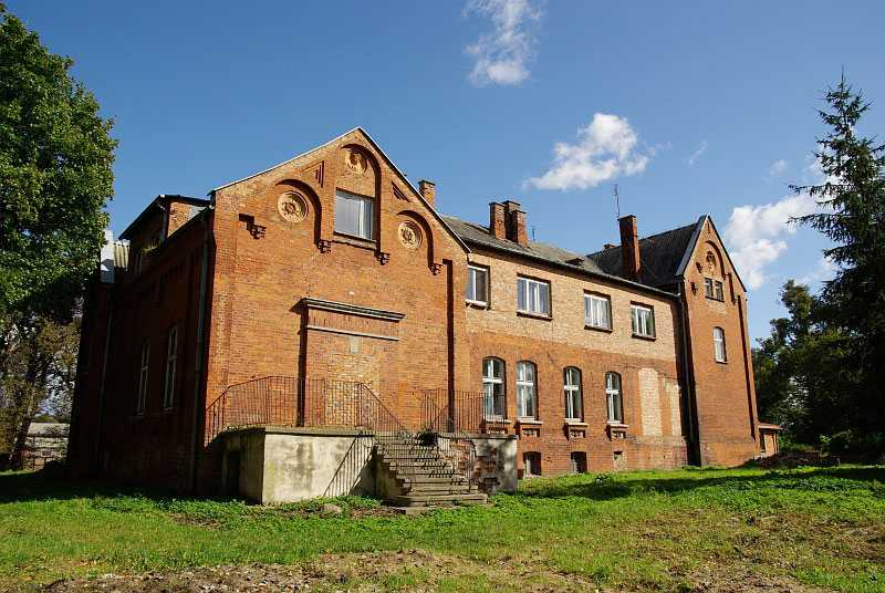 Zamek krzyżacki w Sobowidzu